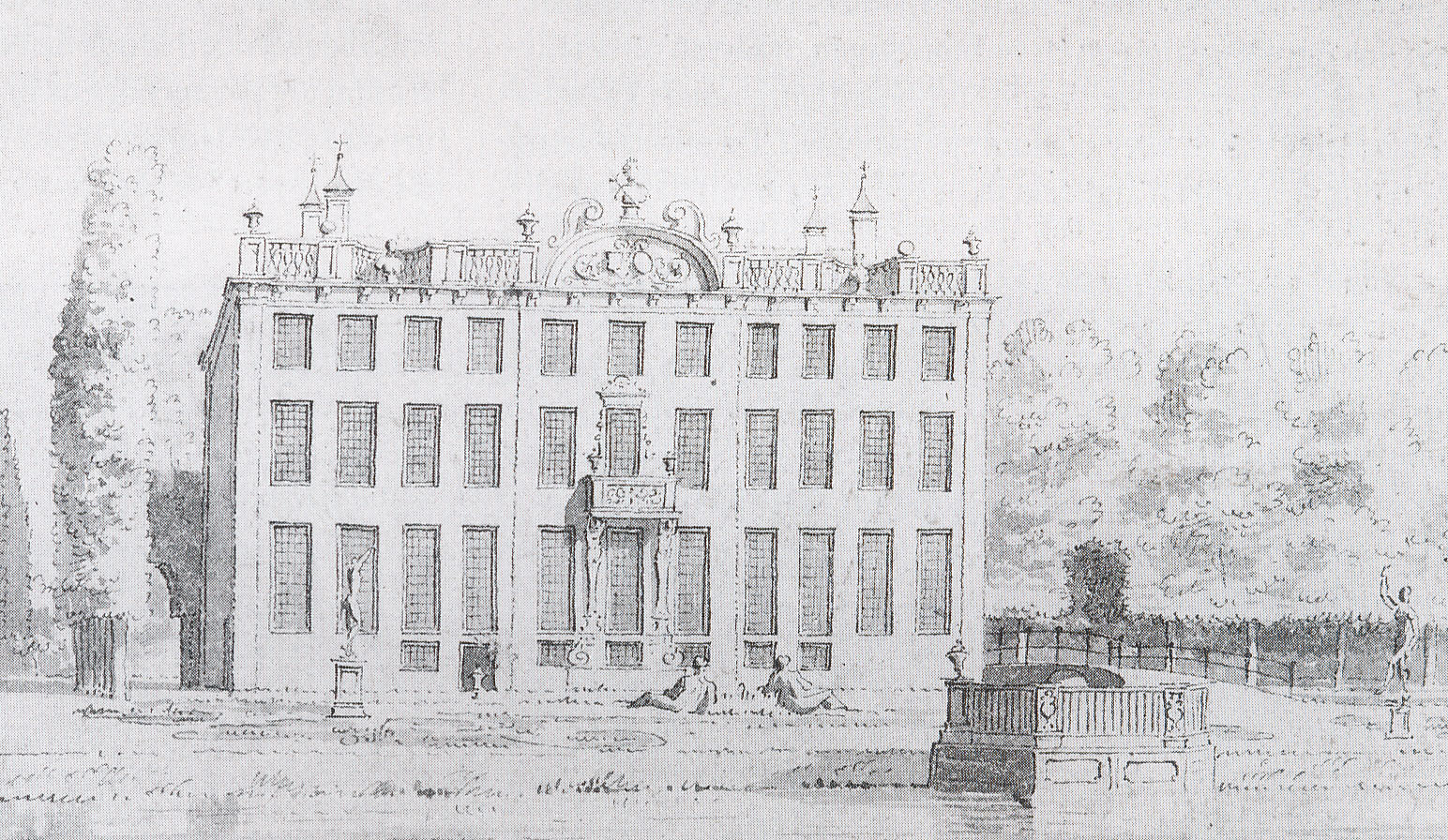 Buitenplaats Ter Meer in Maarssen gezien vanaf de rivier de Vecht.